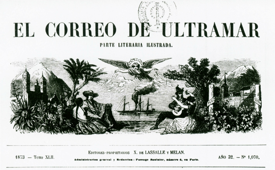 Detalle de la portada de El Correo de Ultramar (1873, tomo XLII, año 32, nº 1070)